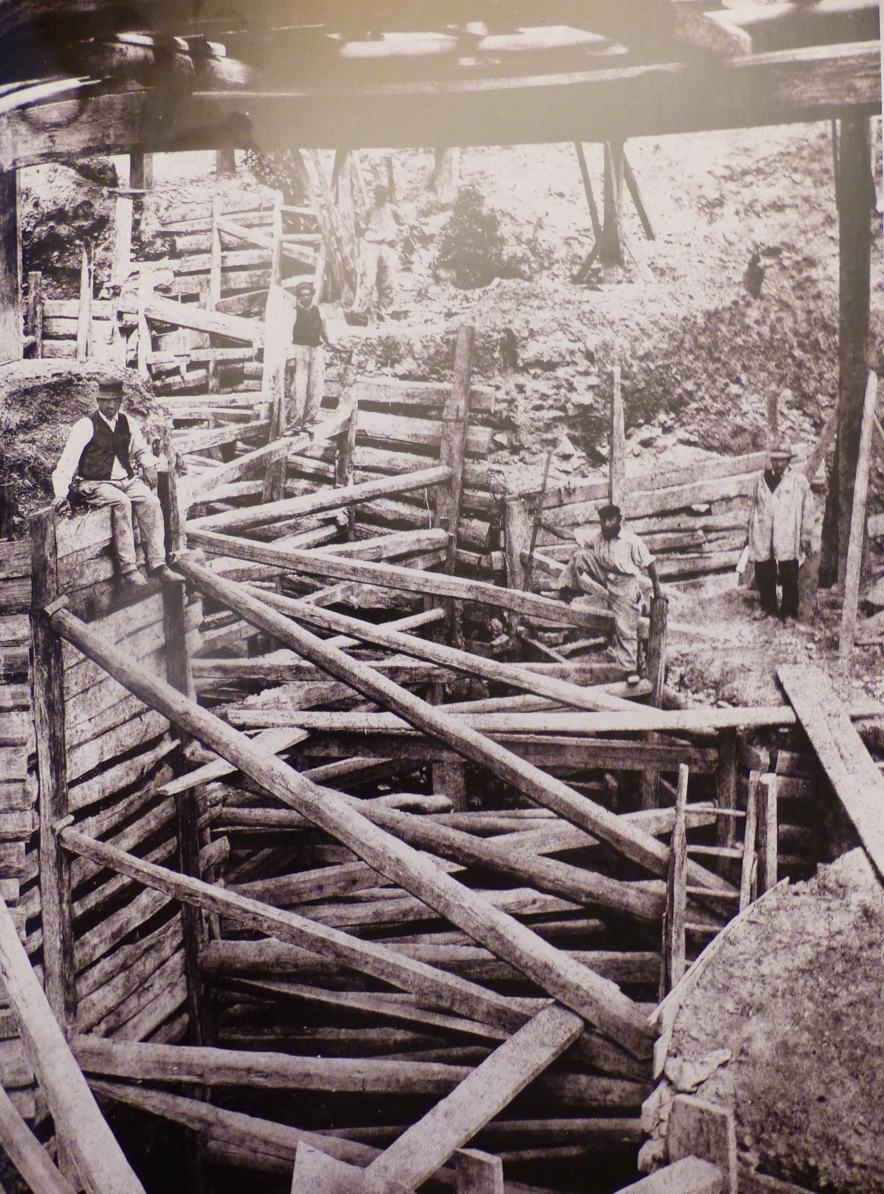 Le boisage d'étaiement des fondations de l'abside de la future basilique de Fourvière ; photographie prise en 1872.